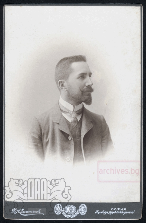 Христо Татарчев.